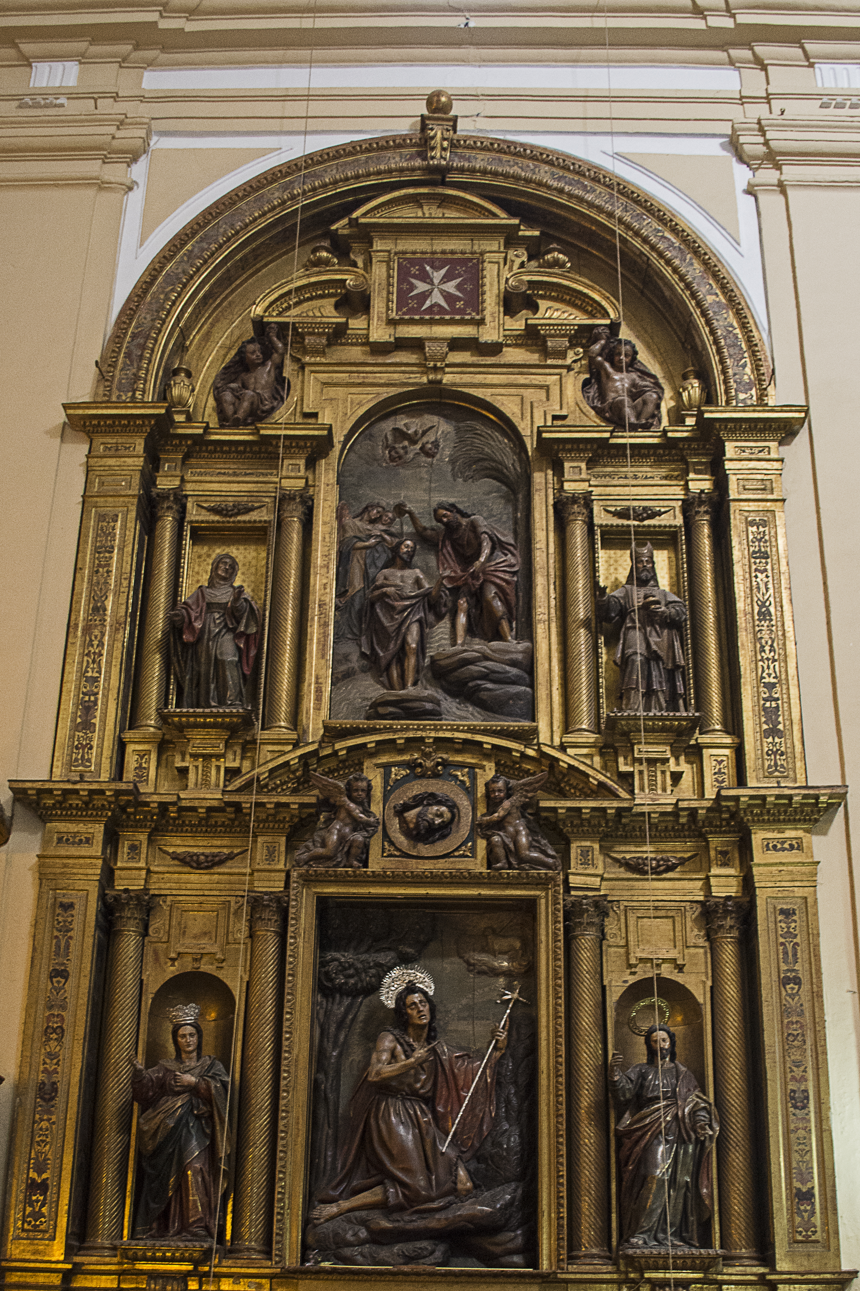 Retablo de San Juan Bautista del convento San leandro (Sevilla). Contratado por Juan Martínez Montañés